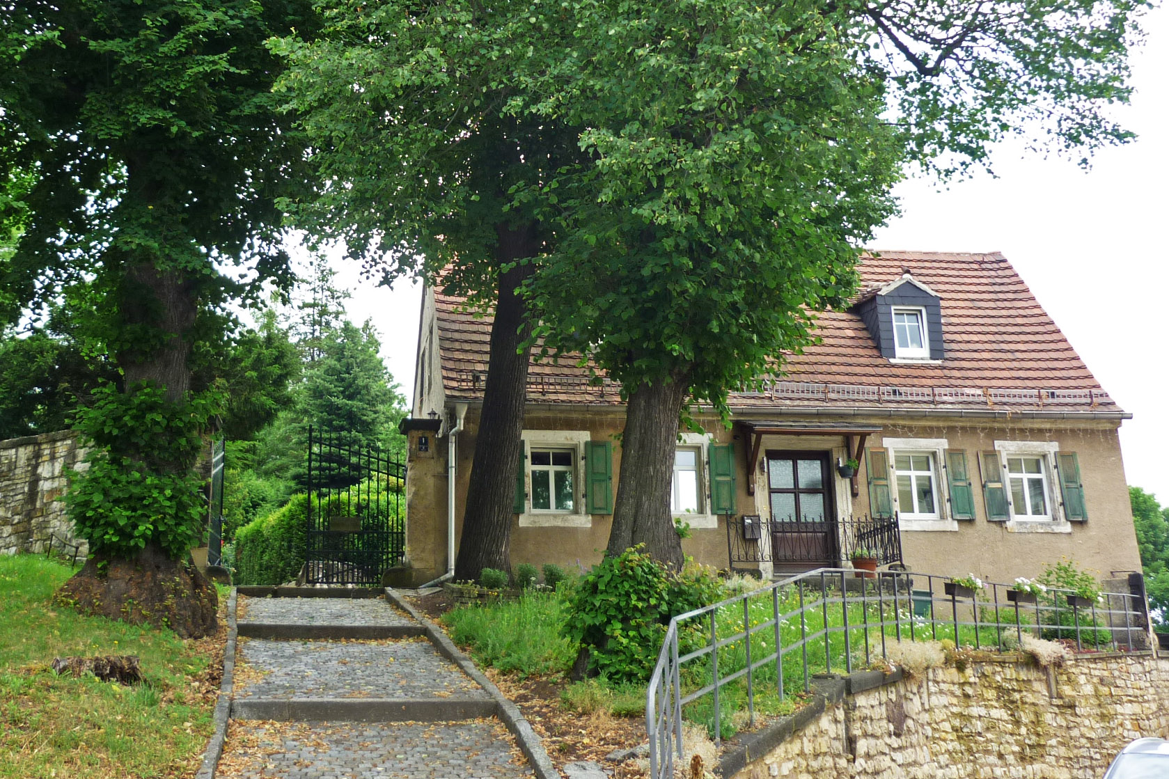 Eingang zum Friedhof Döhlen, Nordstr. 1 in Freital-Döhlen